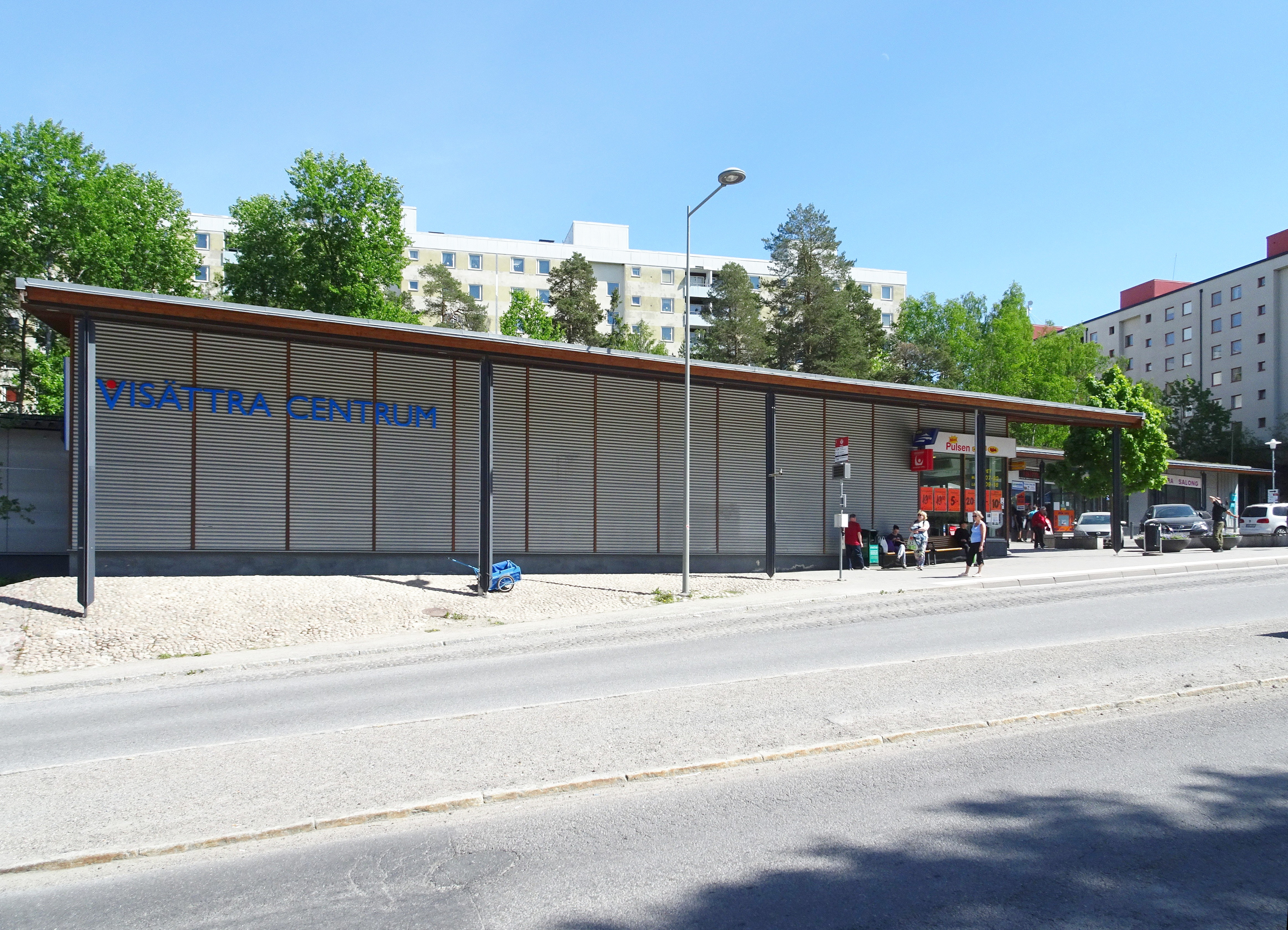 Visättra, Huddinge kommun (Visättra centrum)